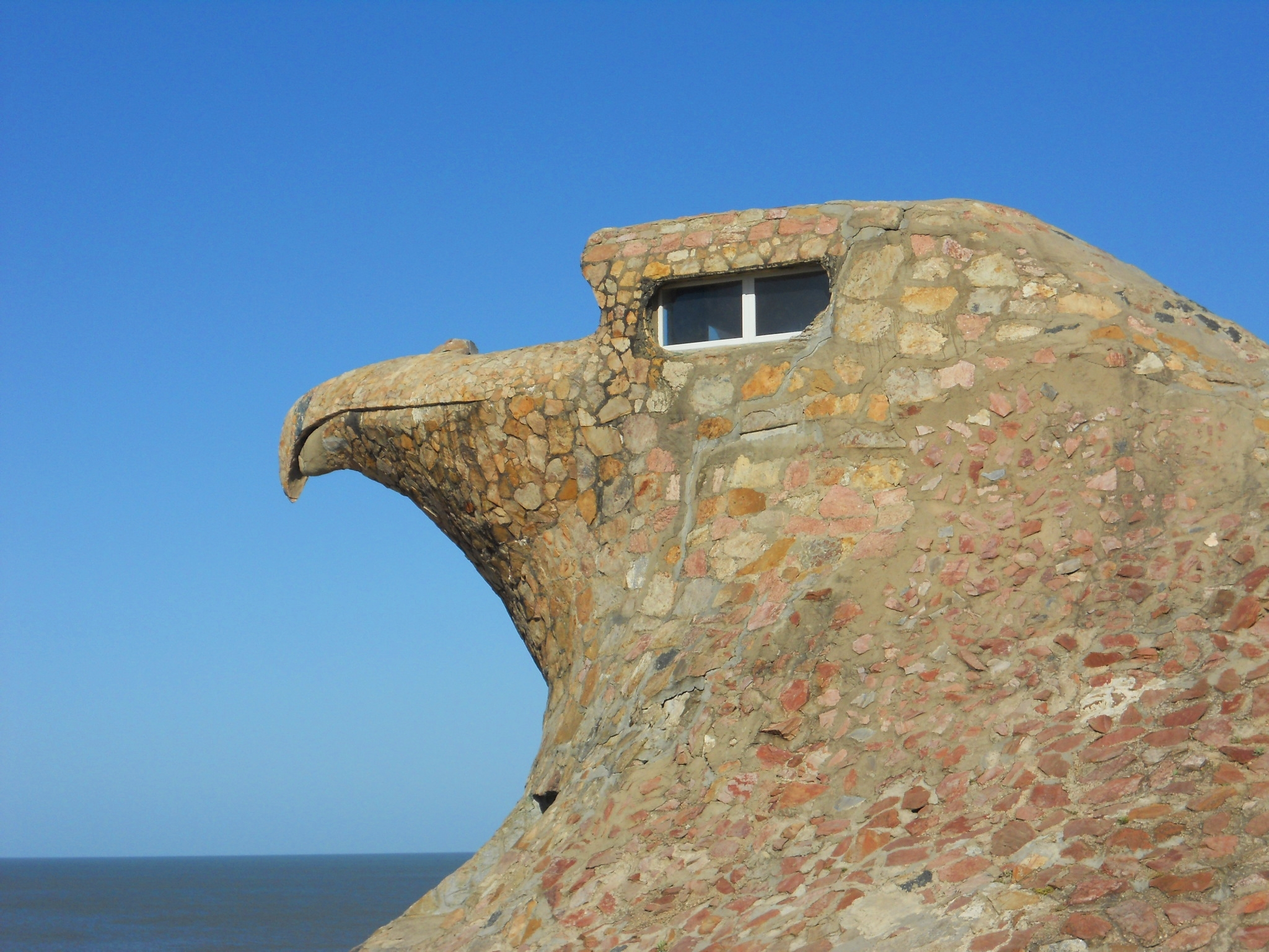 El Águila. Ubicada en el departamento de Canelones